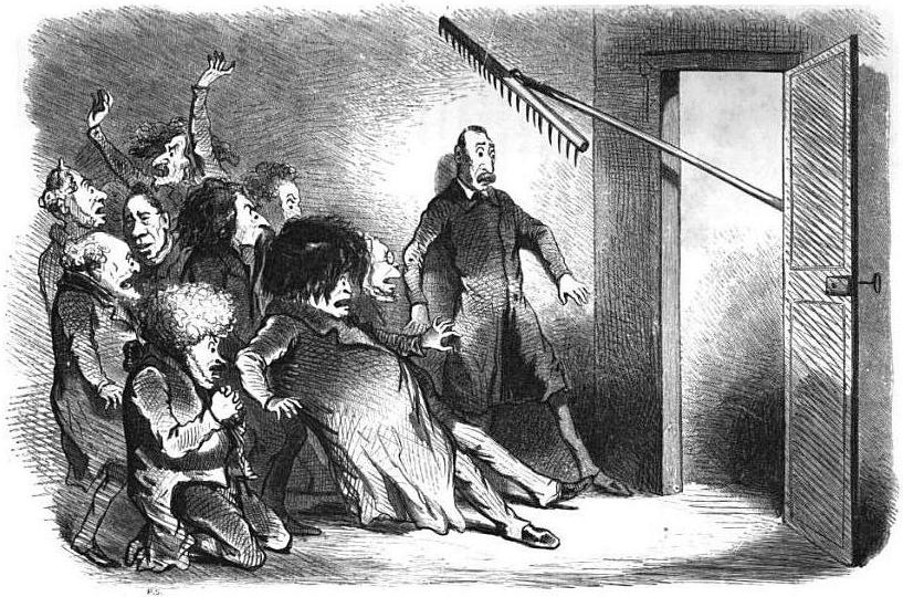 Caricature de Cham illustrant la proposition du représentant Rateau (janvier 1849) visant à dissoudre l'Assemblée constituante élue en avril 1848. Certains représentants sortants craignent d'être « ratissés » par cette dissolution et de ne pas être réélus à l'Assemblée législative. Sont ici caricaturés, de gauche à droite : Luneau (?) ; Sarrans ; Lagrange (à l'arrière-plan) ; Vaulabelle (au deuxième plan) ; Marrast (à genoux, au premier plan) ; Considerant ; Leroux ; Proudhon ; Buvignier.